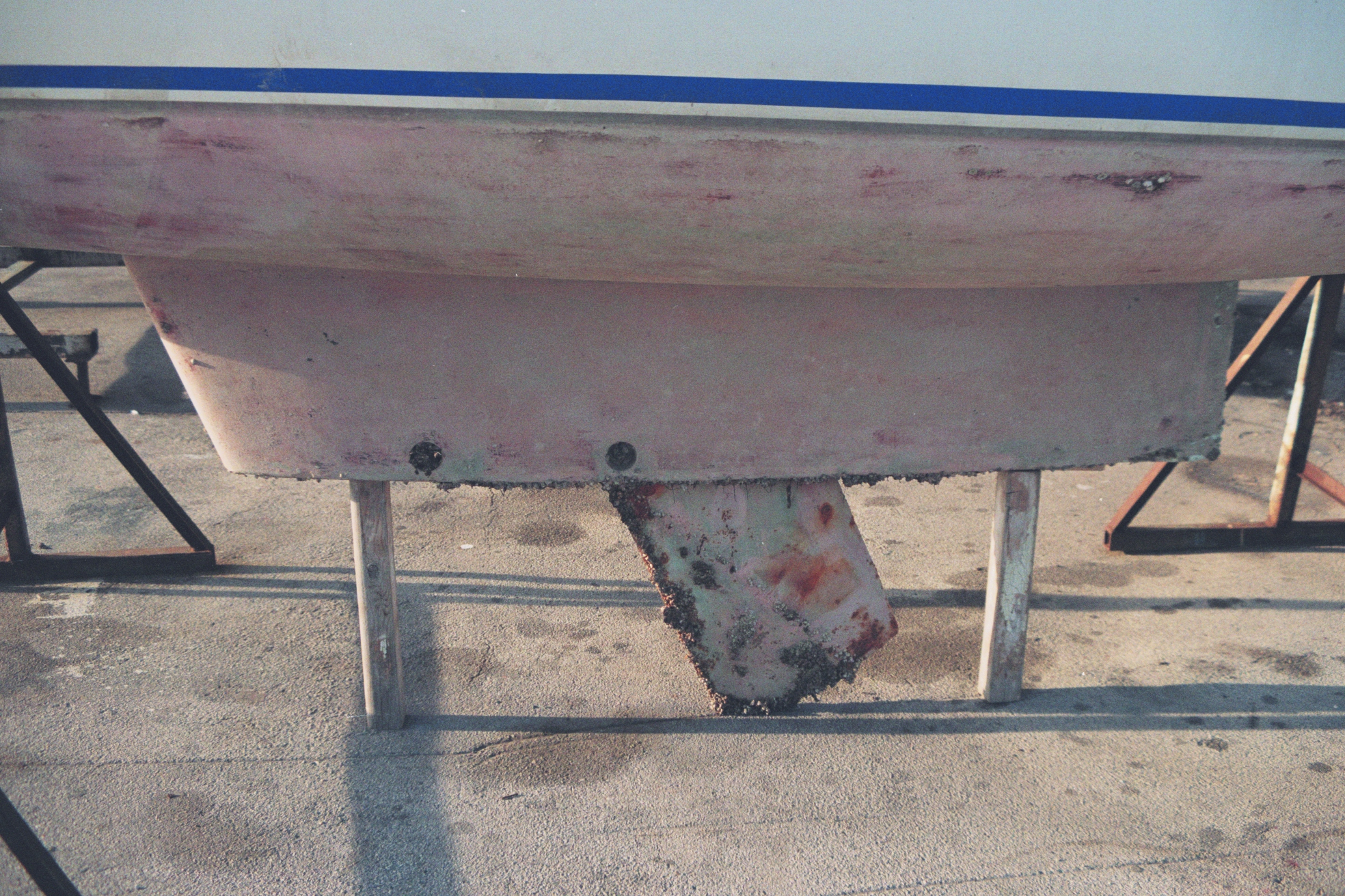 Das ist ein Kielschwert